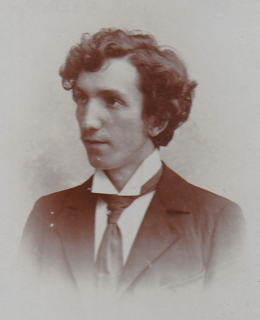 Spisovatel Dominik Filip